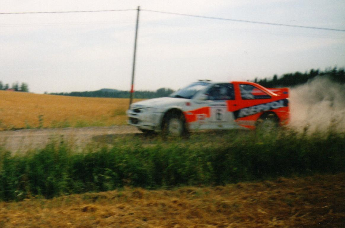 Juha Kankkunen Ouninpohjan erikoiskokeella 1997